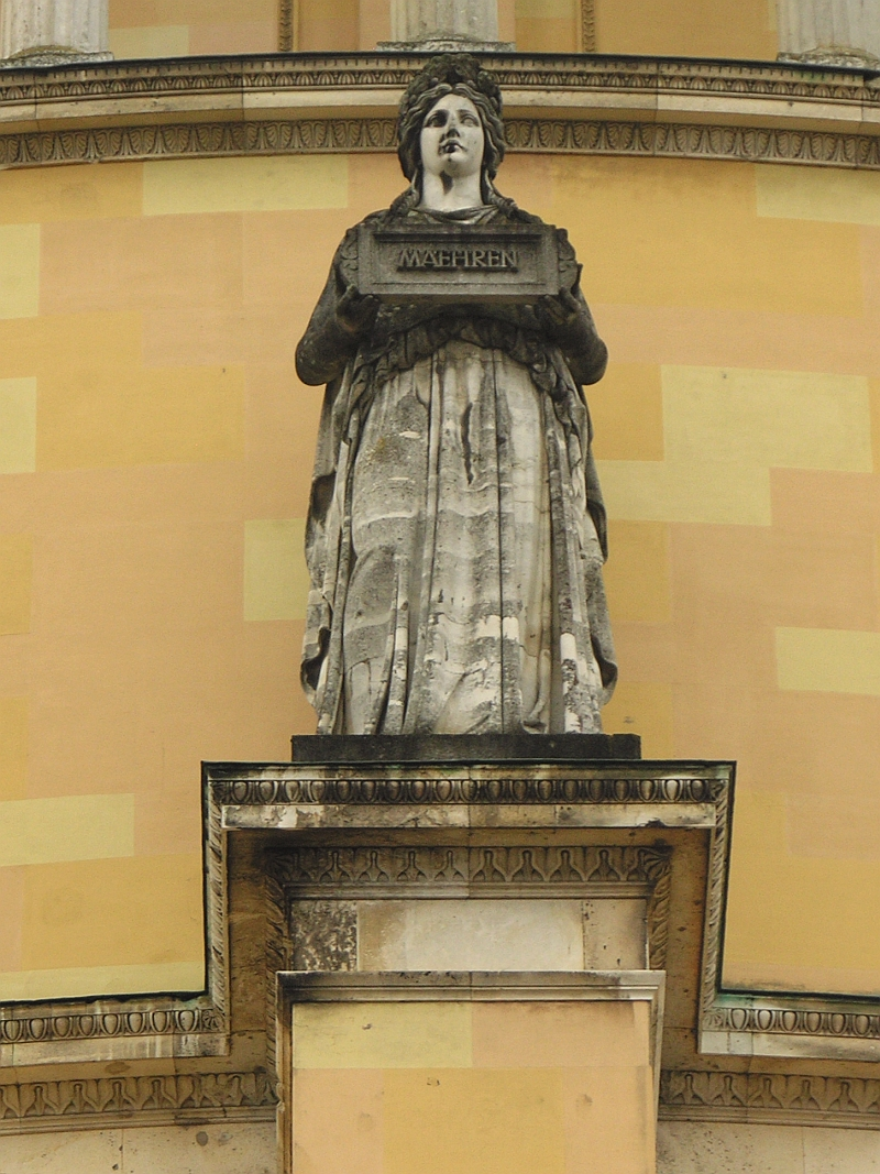 Diese Statue an der Aussenseite der Befreiungshalle in Kelheim steht für den Volksstamm aus Maehren (Schreibweise beachten), Höhe der Statue 580 cm. Sie ist eine von 18 Statuen, die nach Modellen des Bildhauers Johann Halbig geschaffen wurden.